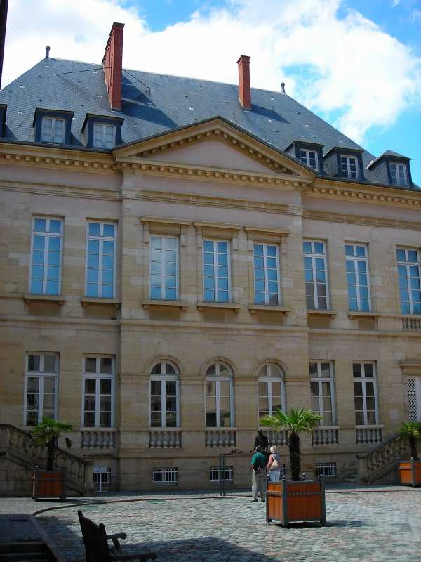 Façace du musée Déchelette de Roanne